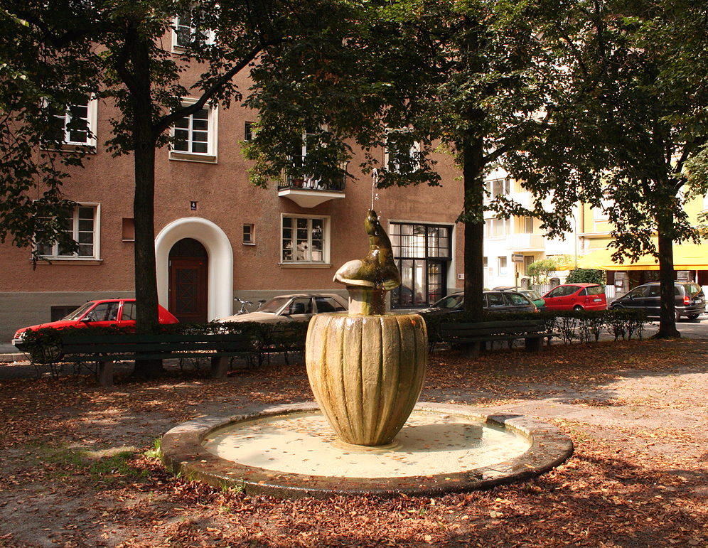 Seehundbrunnen (Common Seal Fountain) in Munich, Bavaria, Municipal District Schwabing-West